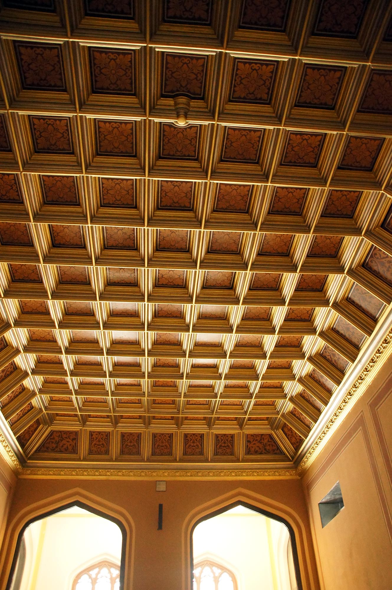 Wrocław, zespół Dworca Głównego